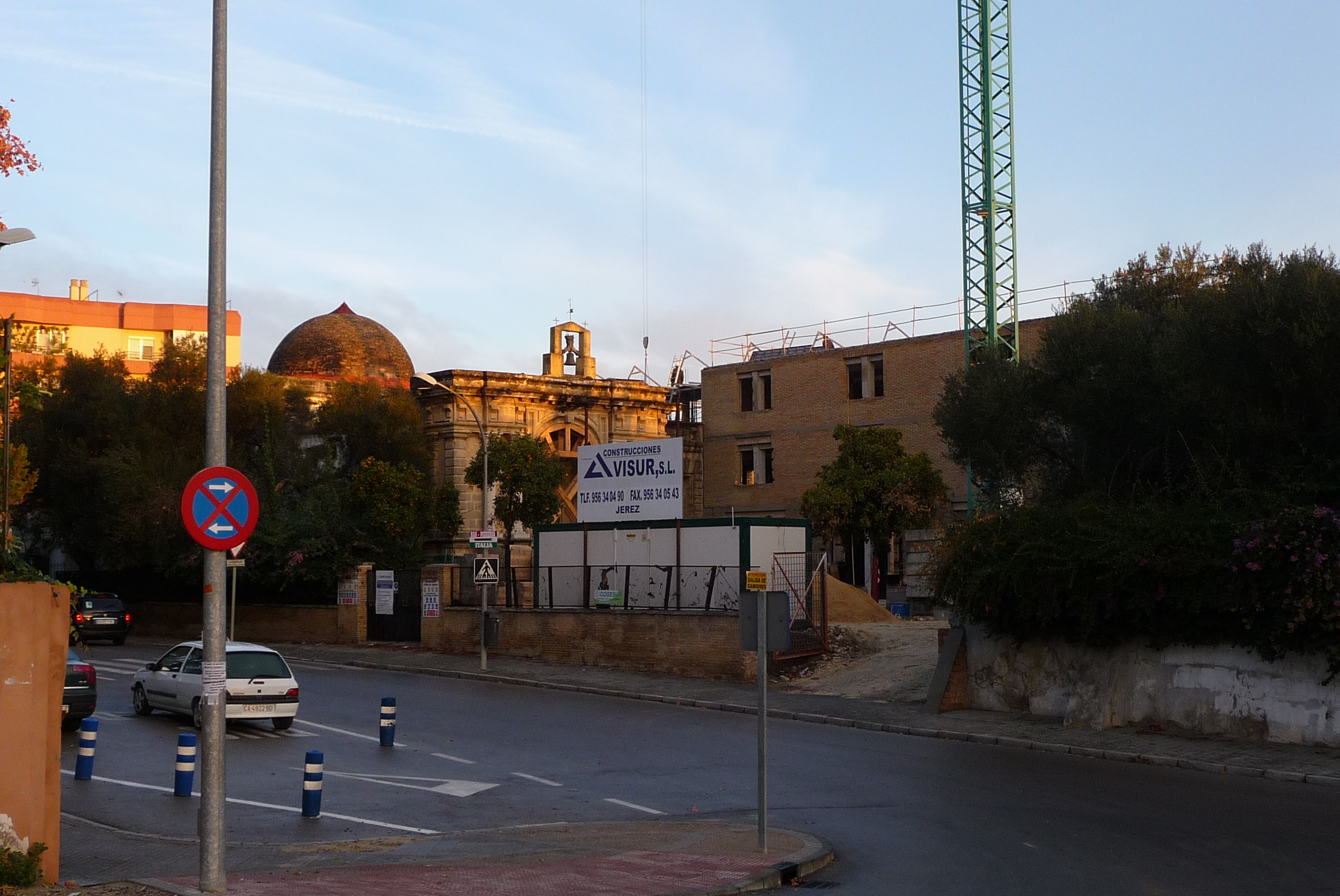 Seminario, Jerez de la Frontera. (Andalusia, Spain).